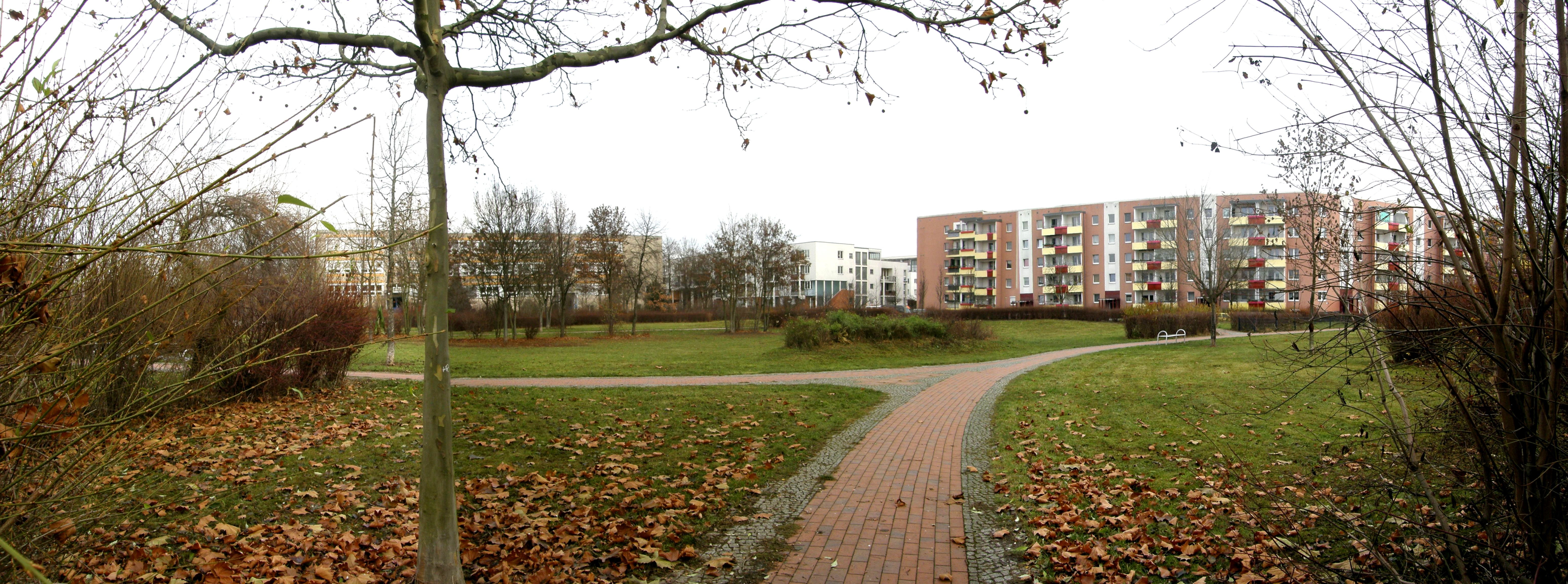 Berlin-Hellersdorf, Mascha-Kalekó-Park, Panorama